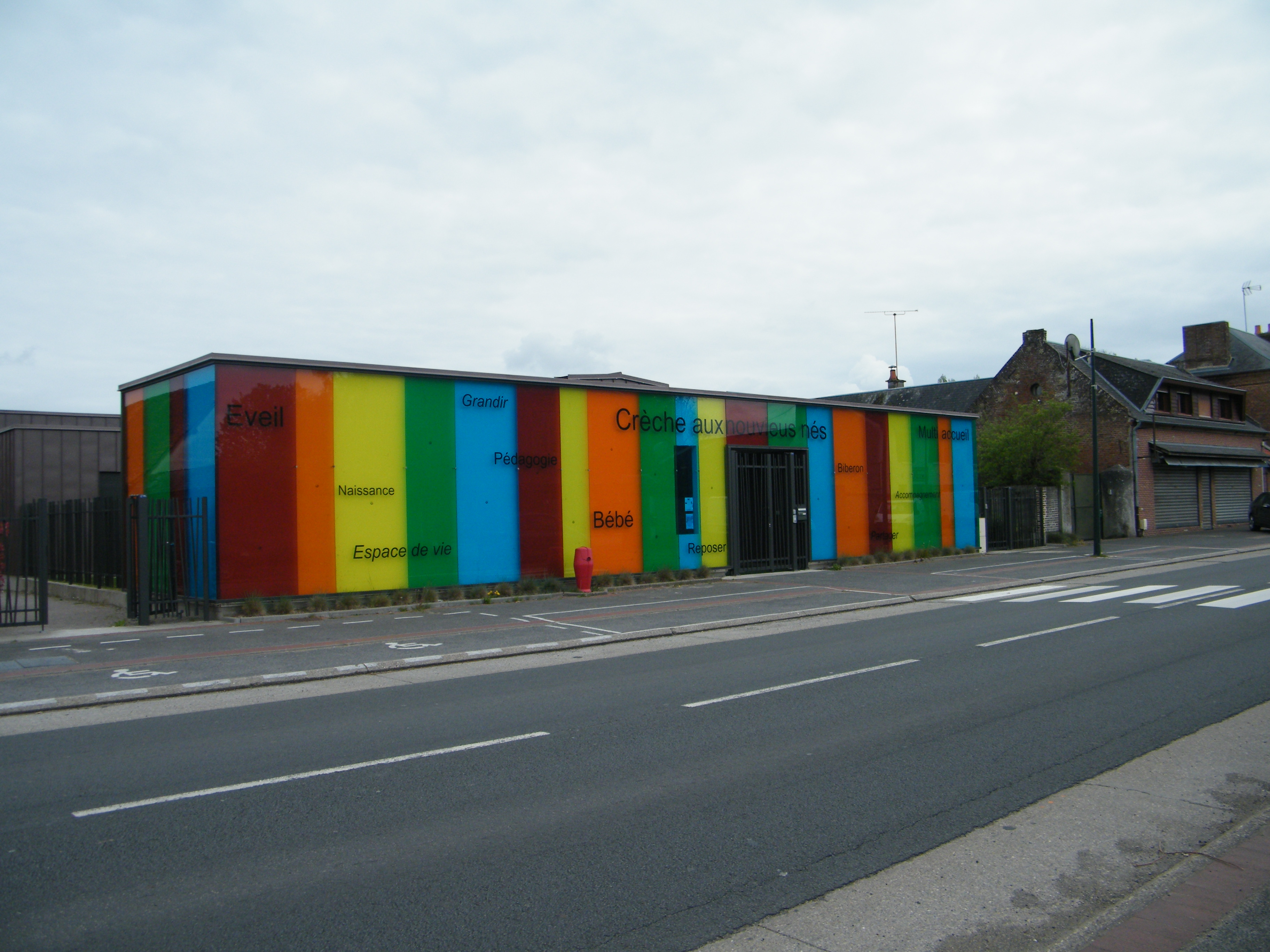 Nouvion, Somme, Fr, crèche intercommunale.